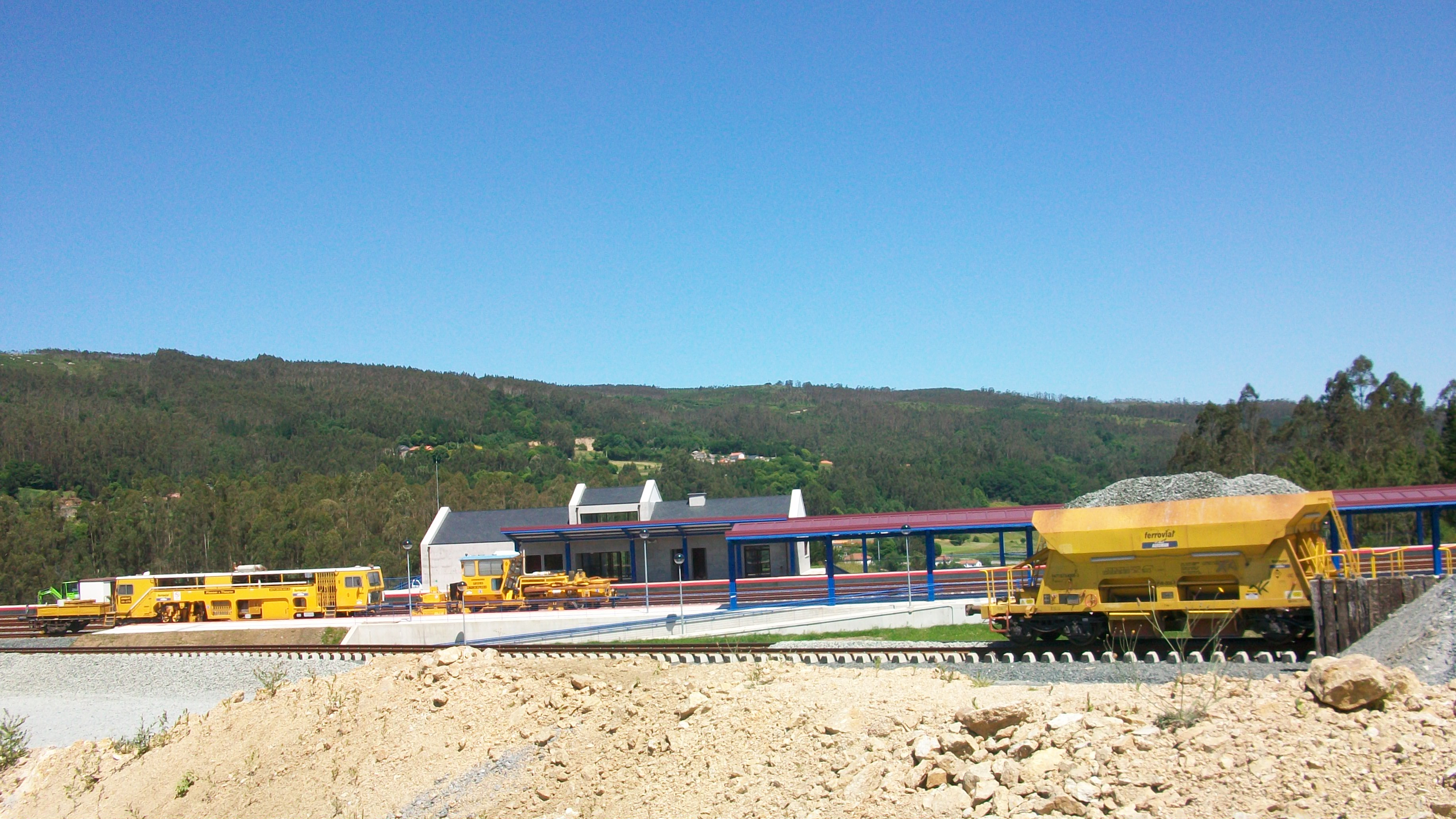 Estación de Cerceda - Meirama.